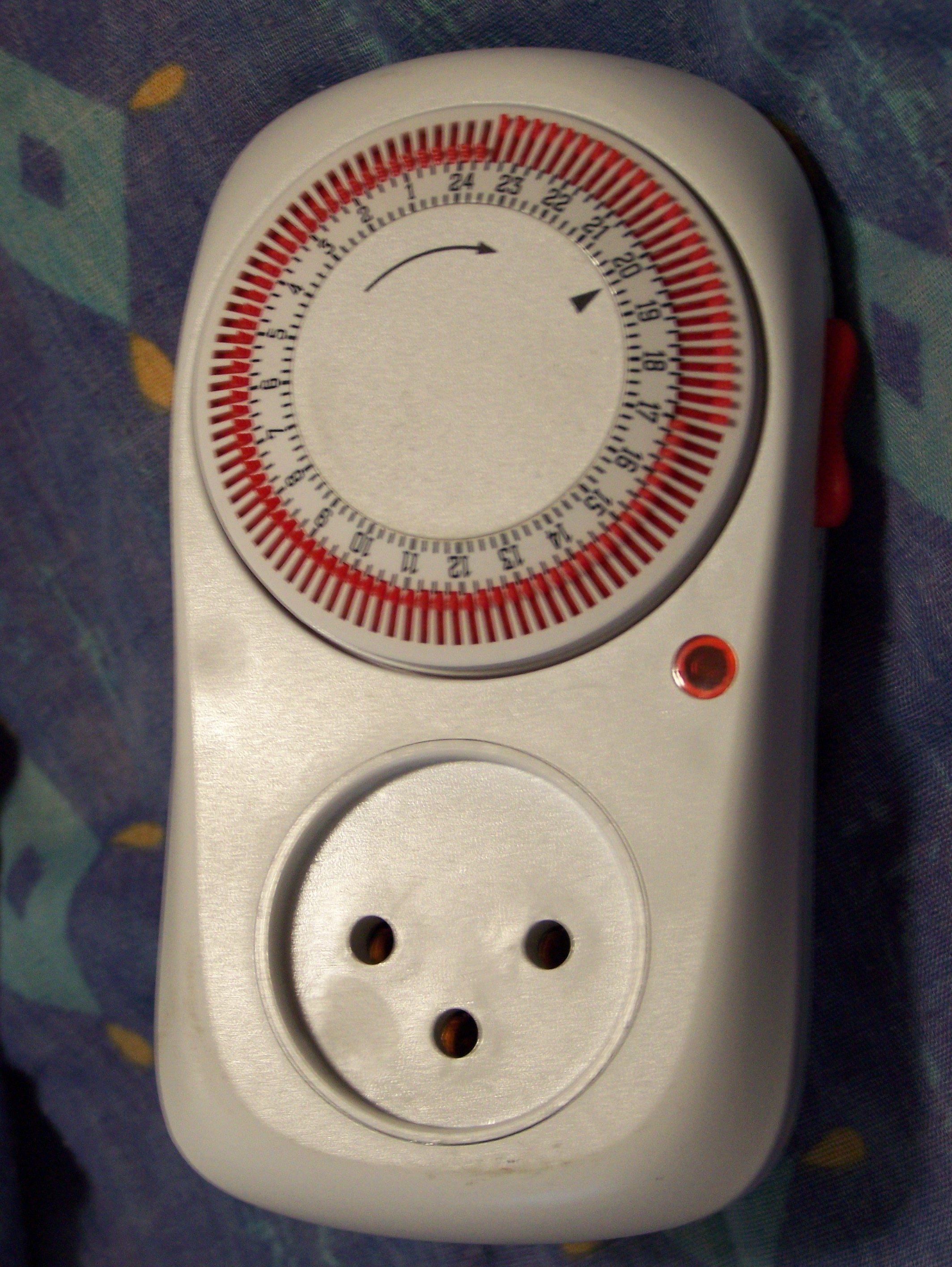 שעון שבת